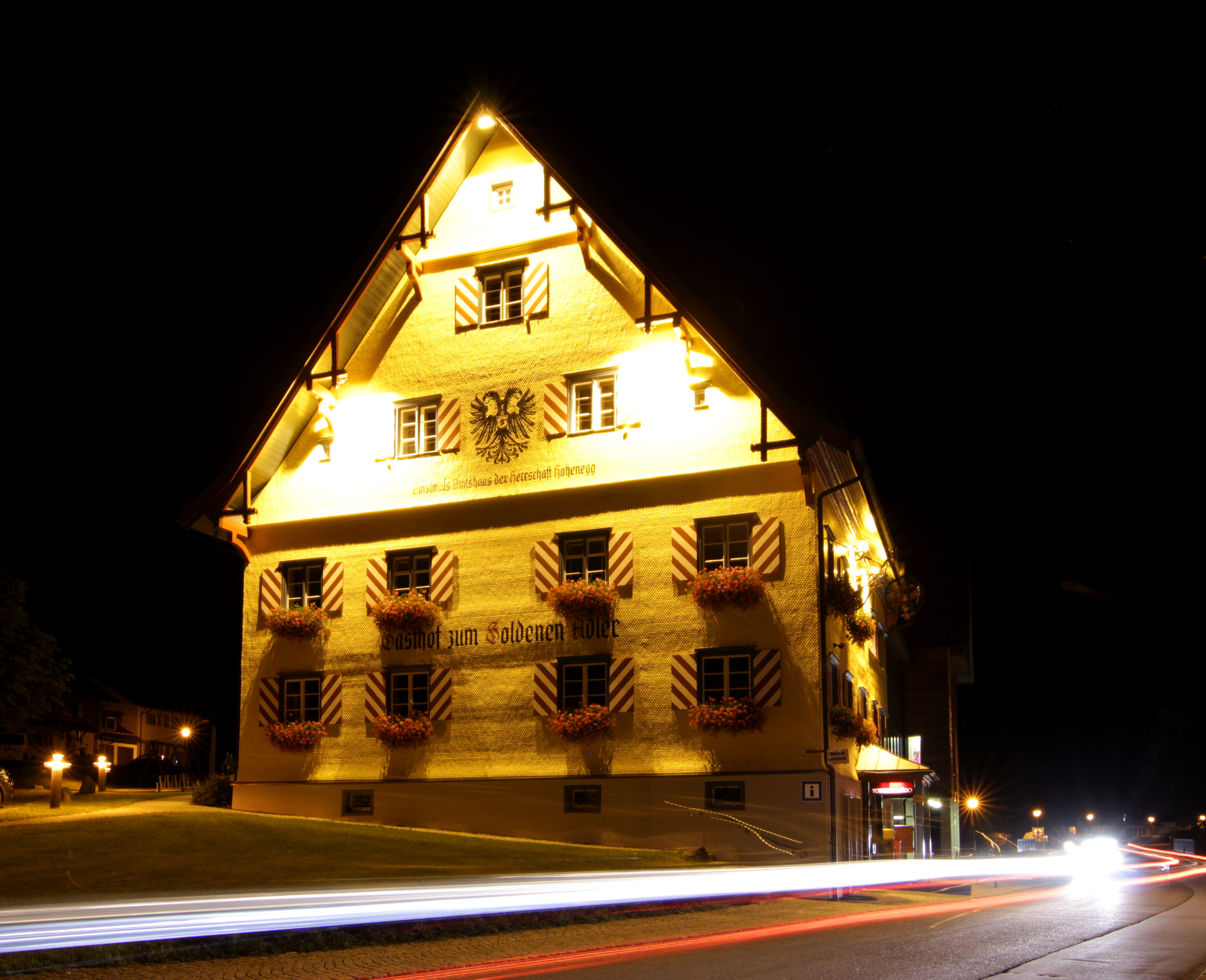 Gasthaus Adler in Weitnau. Ehemals Amtshaus der Herrschaft Hohenegg. Neubau des Gebäudes vermutlich 1753. Erste Erwähnungen des Vorgängerbaus um 1200. Beherbergt heute eine Gaststätte, das Tourismusamt und die Gemeindebücherei.This is a photograph of an architectural monument.